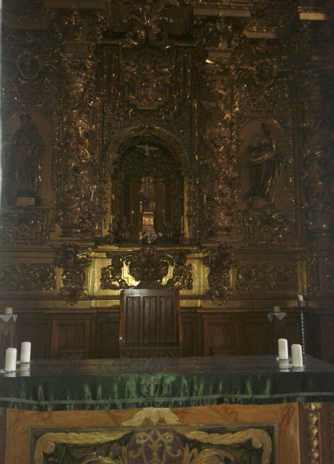 Ermita de la virgen de Idoya, Isaba, Navarra